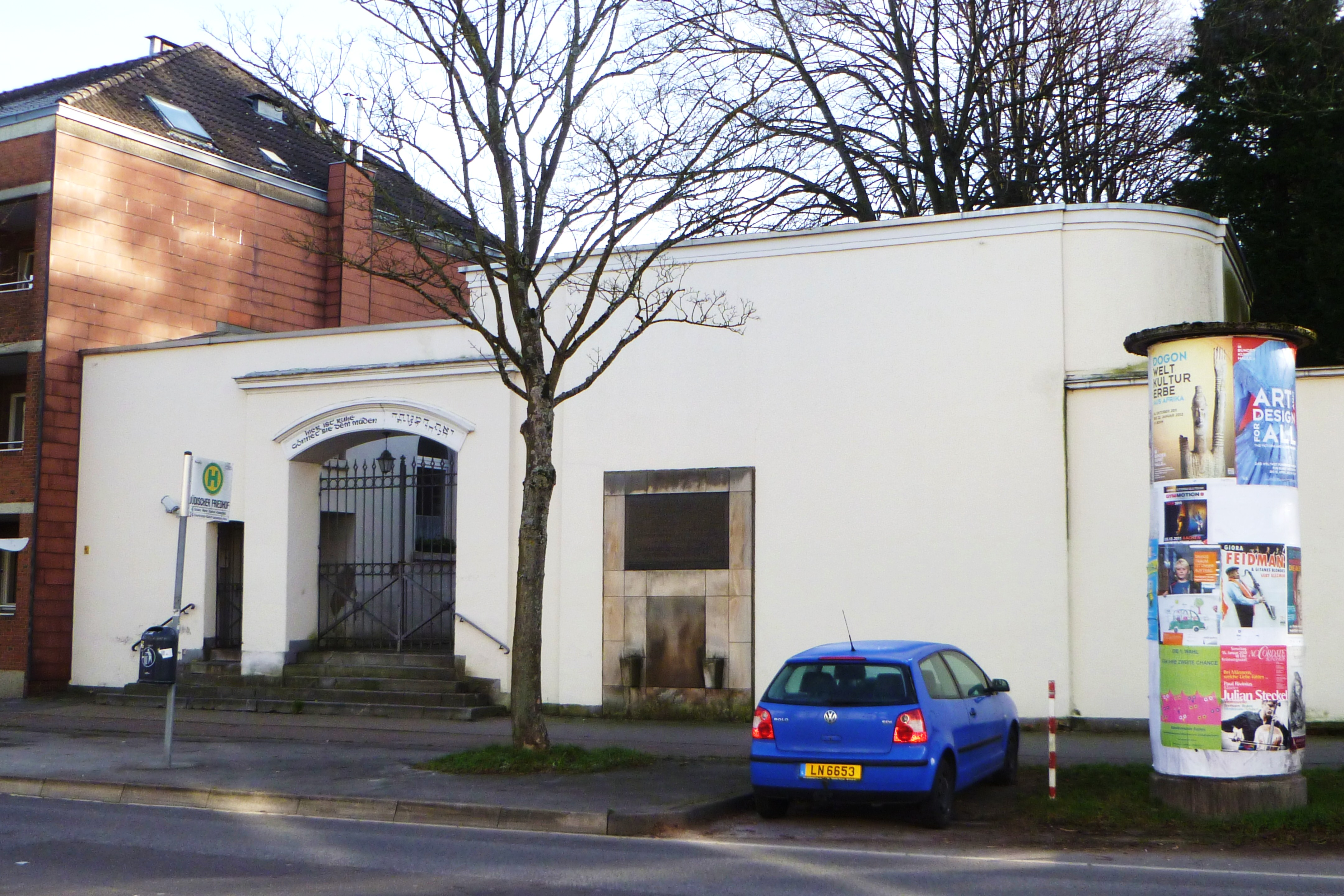 Baudenkmal in Aachen-Mitte